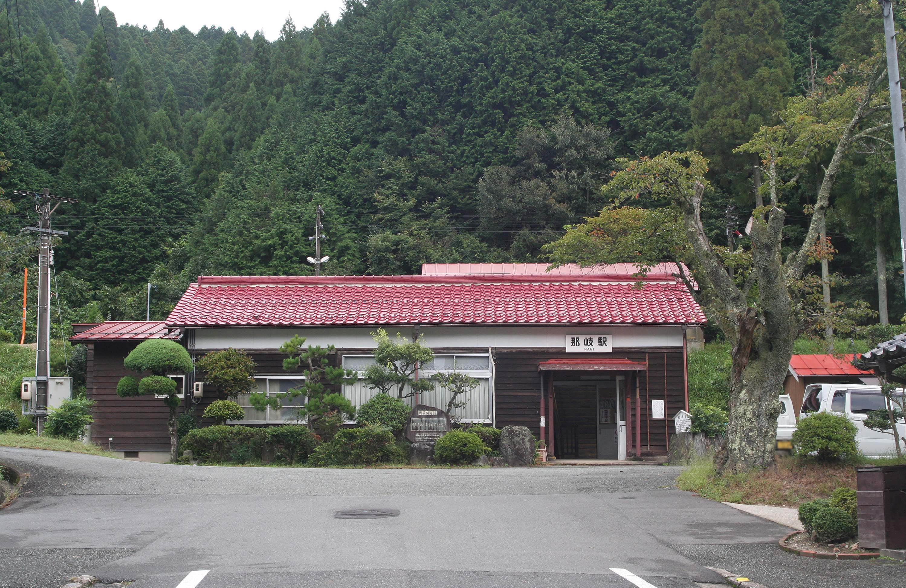 西日本旅客鉄道 那岐駅の駅舎